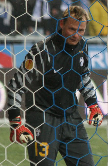 Alexander Manninger difende la porta su un calcio d'angolo, Lech Poznań vs Juventus, UEFA Europa League, 1º dicembre 2010.